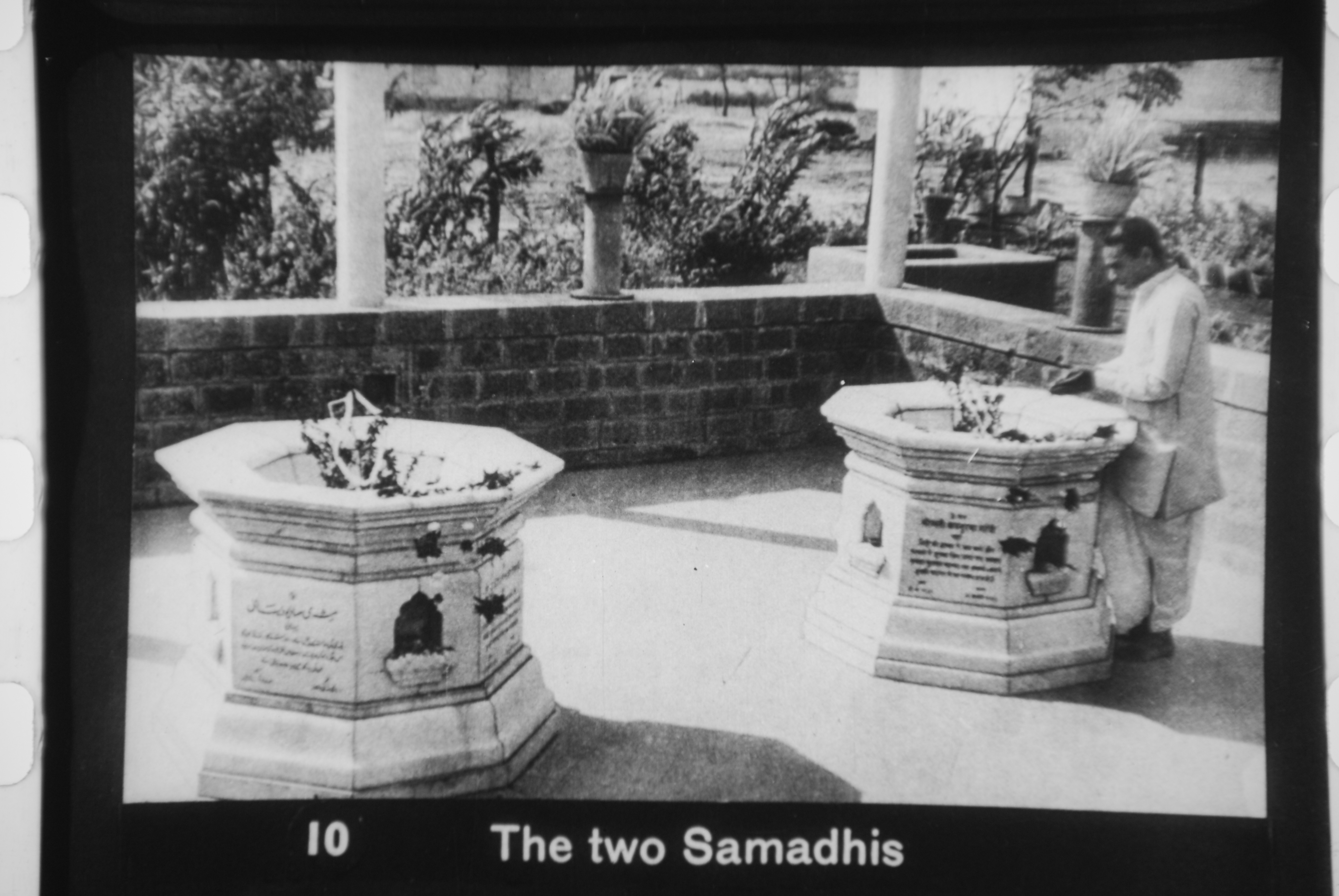 Samadhis of Kasturba Gandhi and Mahadev Desai, Aga Khan Palace, Pune.